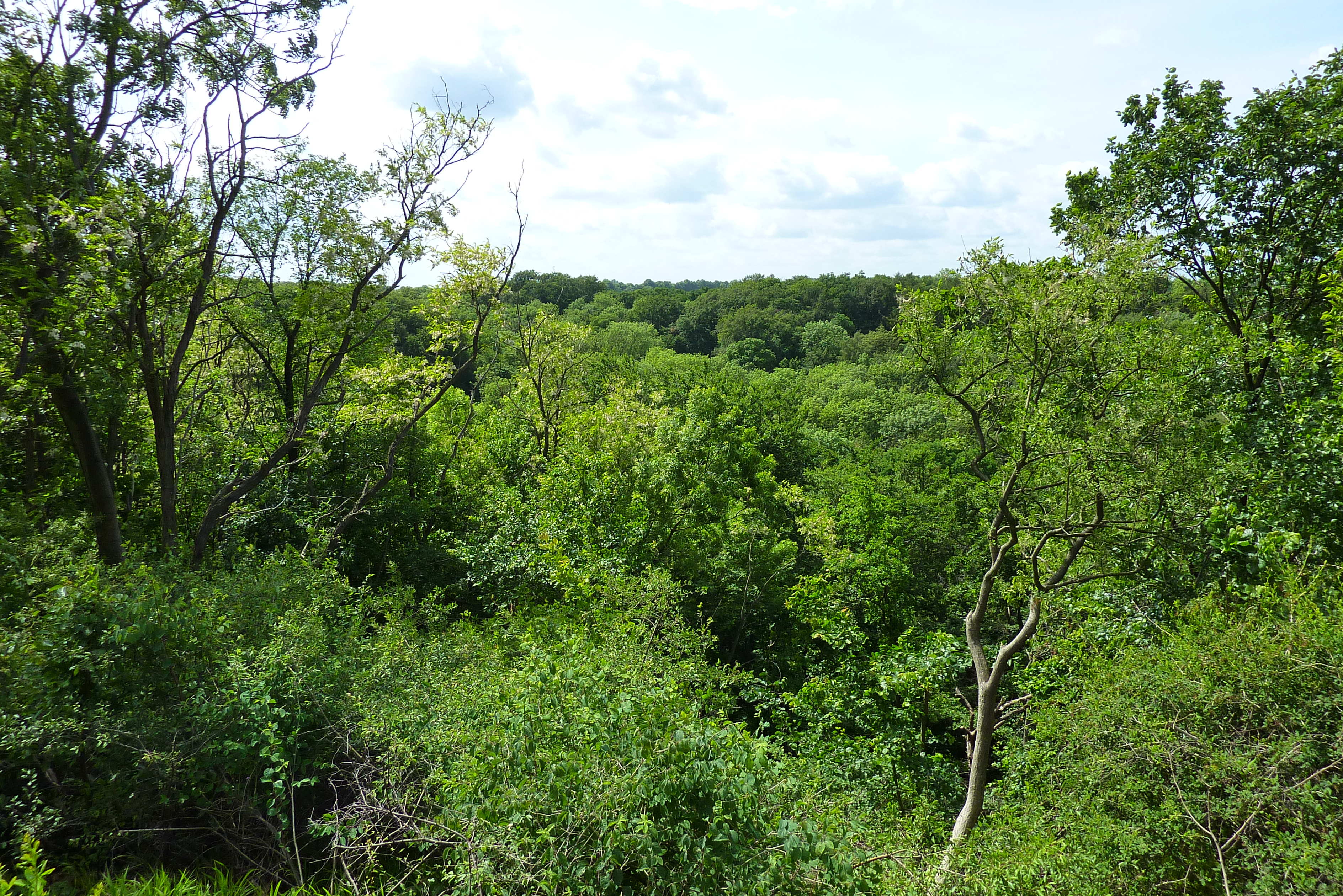 Dolina Miłości - okolice wsi Zatoń Dolna